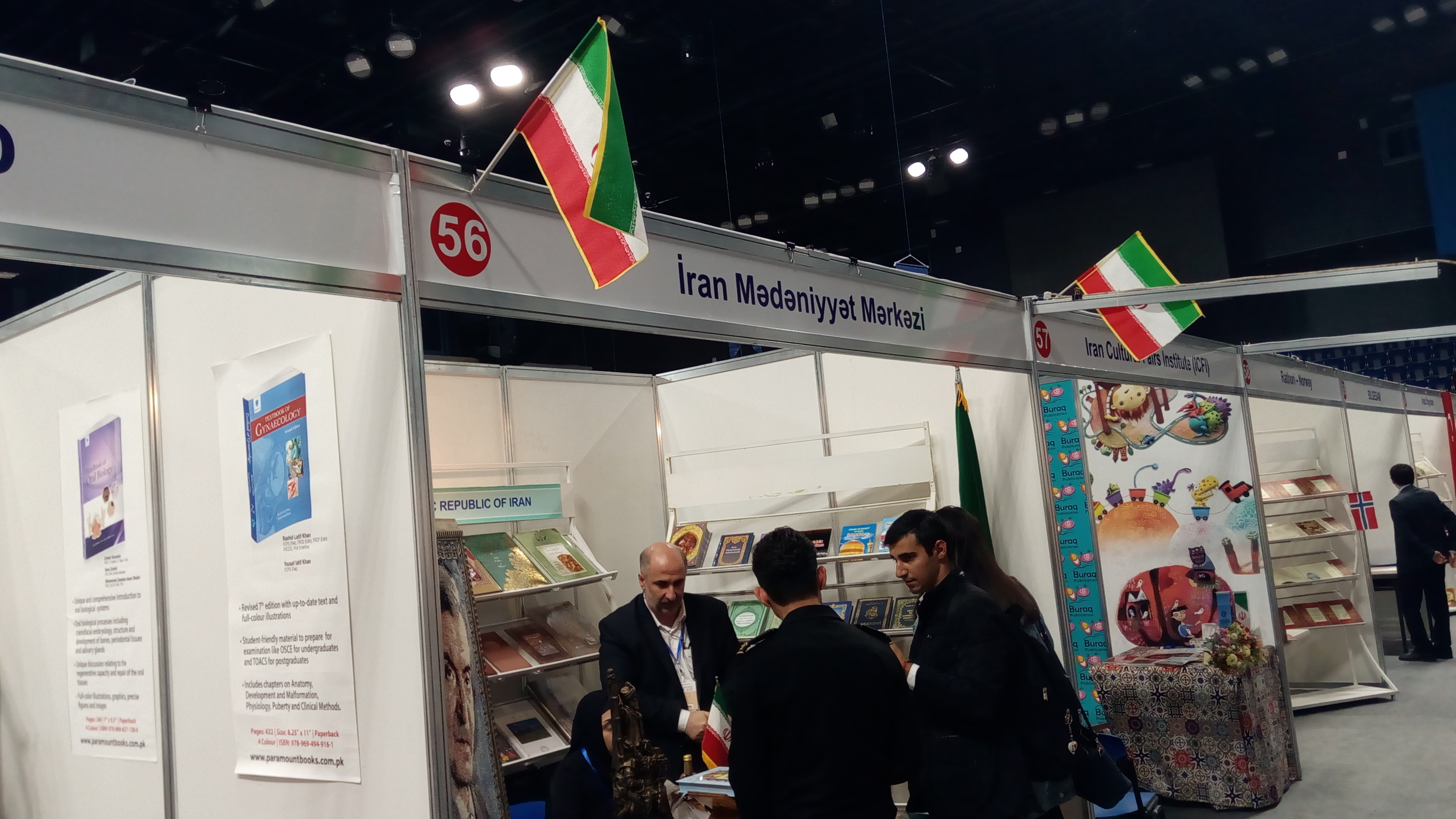 V Bakı Beynəlxalq Kitab Sərgi-Yarmarkası